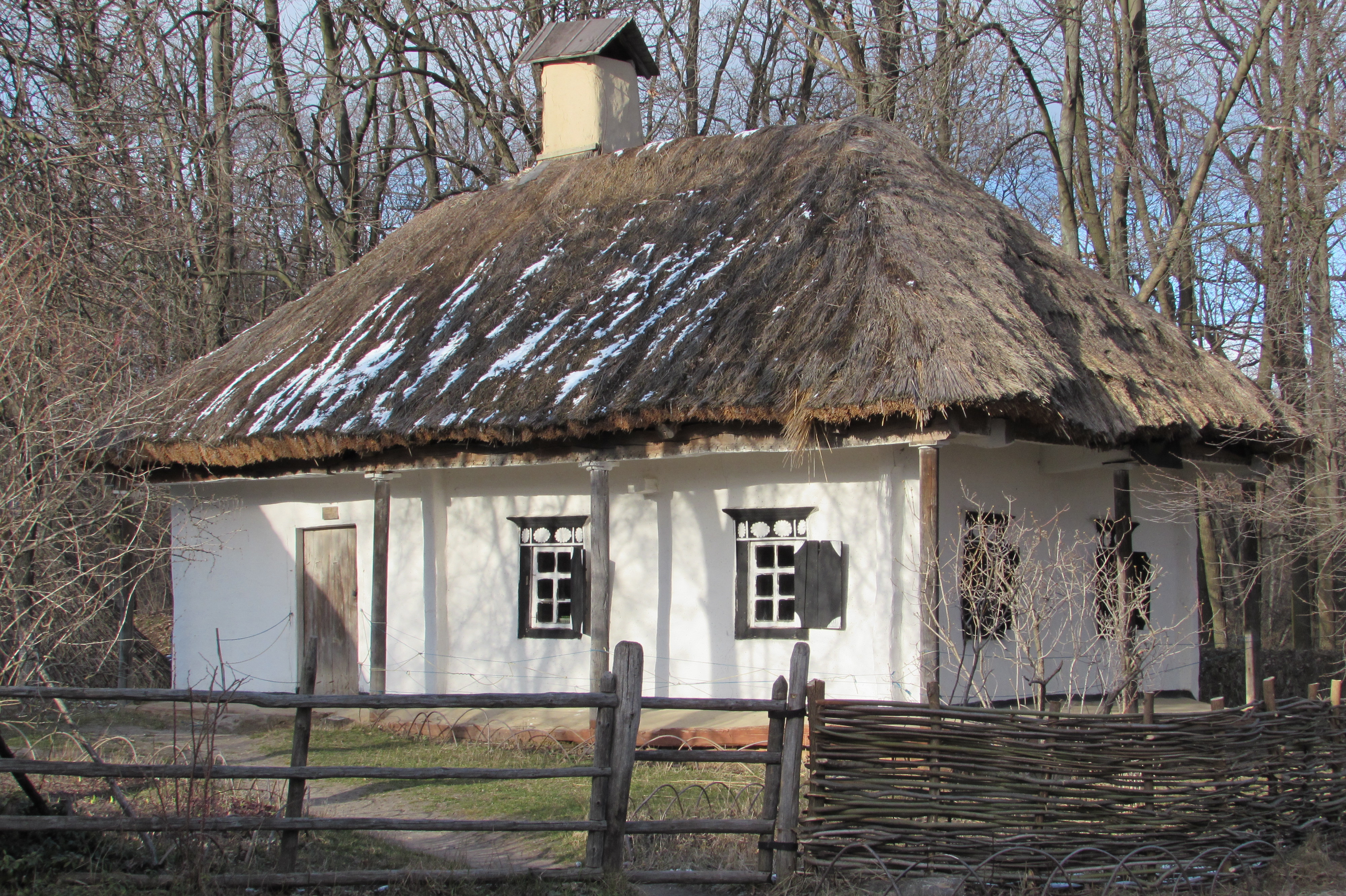 Хата з села Червонопопівка Кремінського району Луганської області, Київ, Пирогів